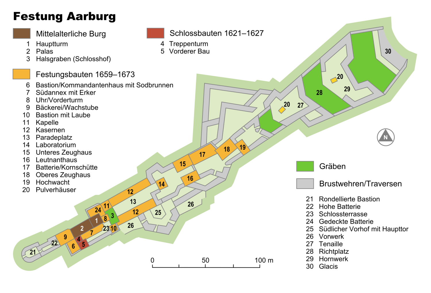 Plan der Festung Aarburg